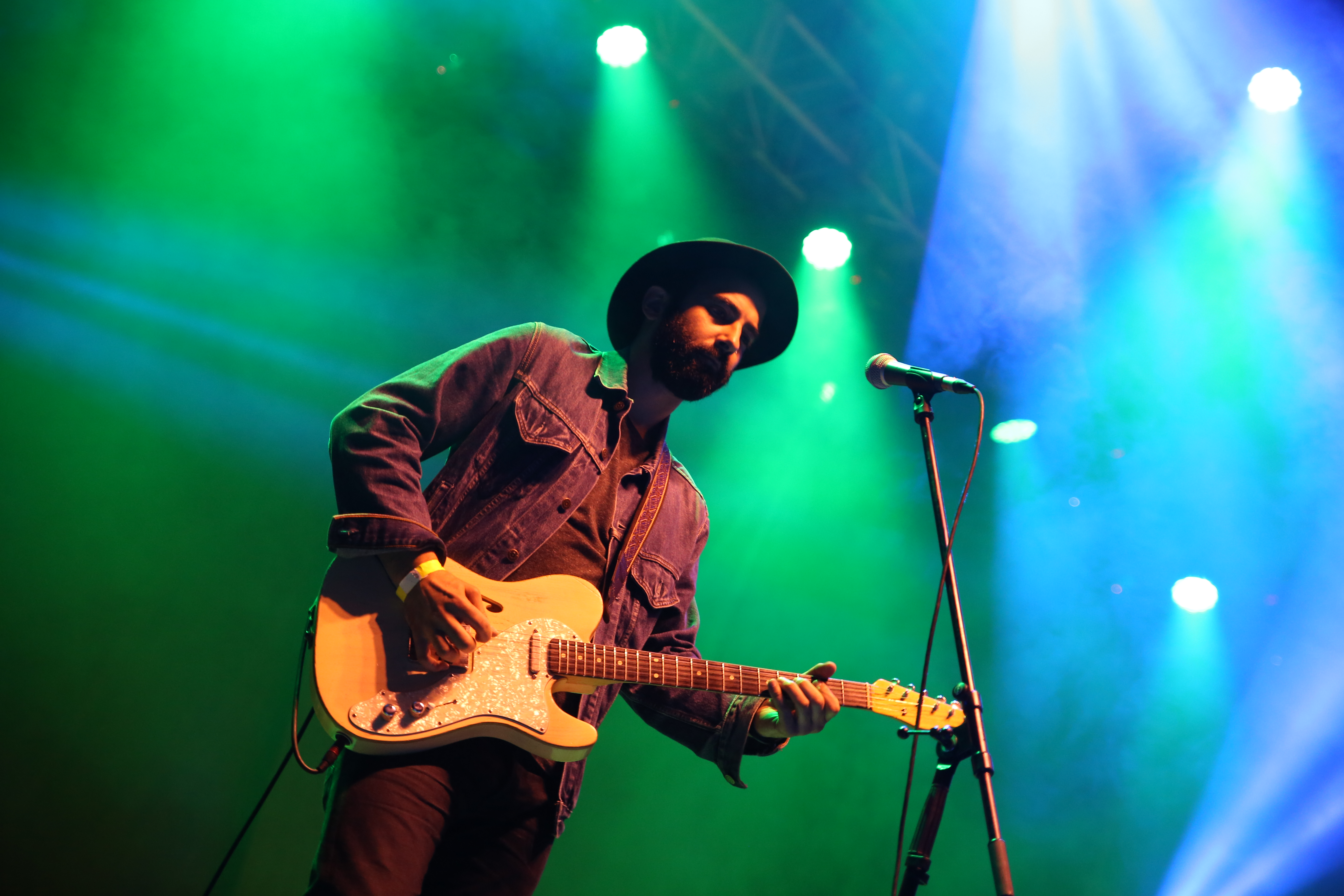 El grupo Amatria en el festival Palencia Sonora 2017.